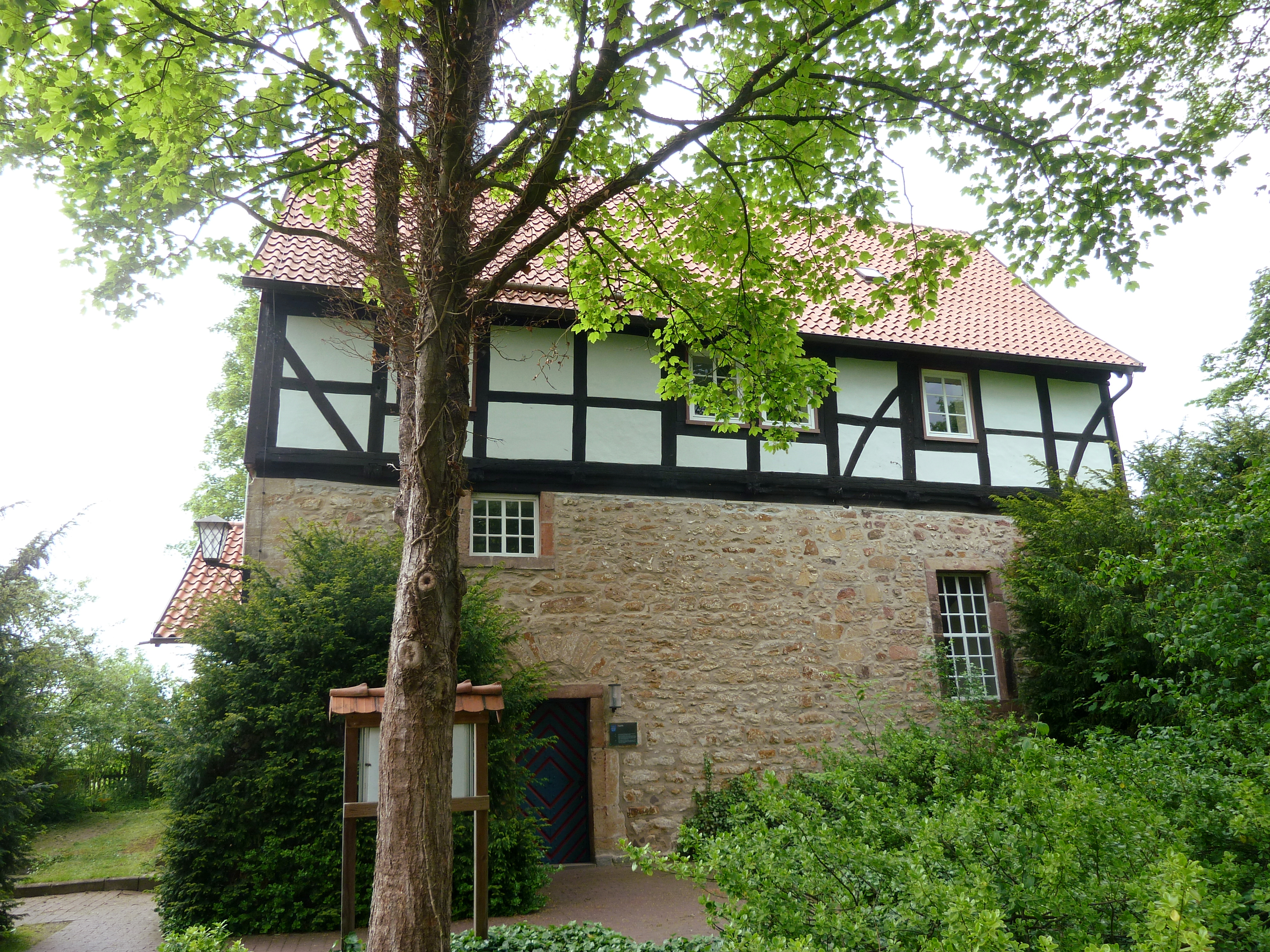 Kapelle in Schnedinghausen, Stadt Northeim, Südniedersachsen. Ehemalige Kapelle des Amelungsborner Klosterhofes. Unteres Geschoss in Bruchsteinmauerwerk, im Kern aus der Zeit um 1285, nach dem 30jährigen Krieg wieder aufgebaut und mit Fachwerk-Obergeschoss versehen (Quelle: Informationstafel am Gebäude). Heute Kapelle der Ev.-luth. Trinitatis-Kirchengemeinde Leine-Weper, der hauptsächlich Moringer Ortsteile angehören.